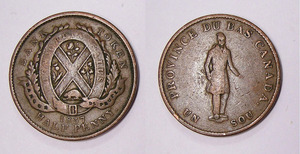 Avers: (en anglais) Bank Token, Half Penny, 1837, Concordia Salus, Banque du Peuple — Revers: (en français) Province du Bas Canada, Un Sou. Jeton bancaire en cuivre, 9 g, émis par la Banque du Peuple, frappés par Boulton & Watt; cf. Jeton habitant.